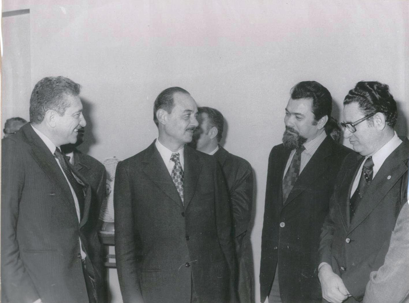 تصنيف:محمد الجمسي تصنيف:عسكريون مصريون